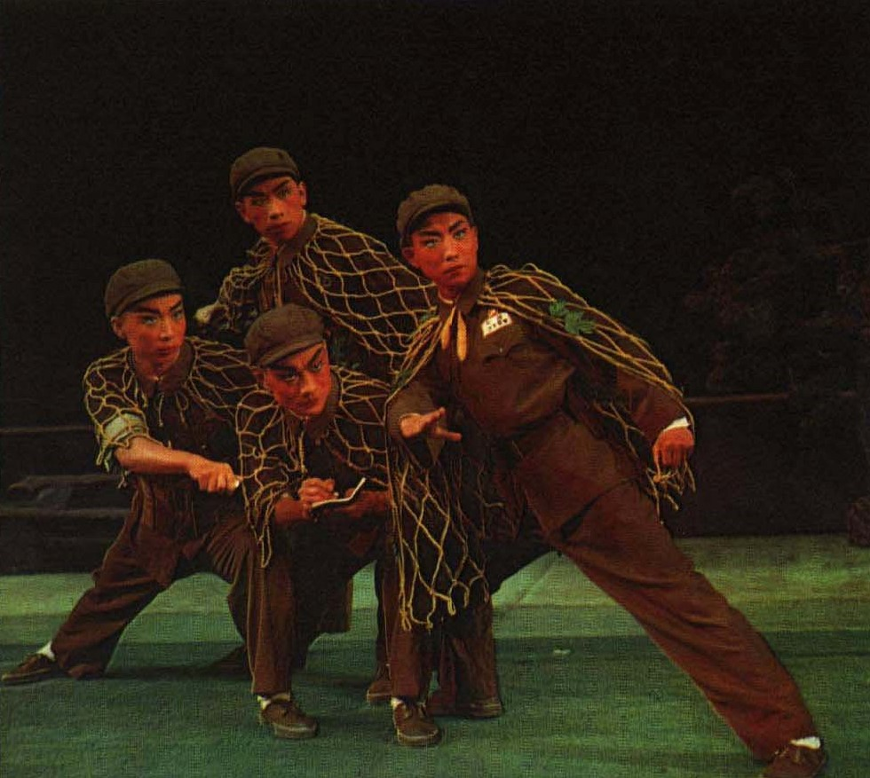 1967-08 1967年 奇袭白虎团